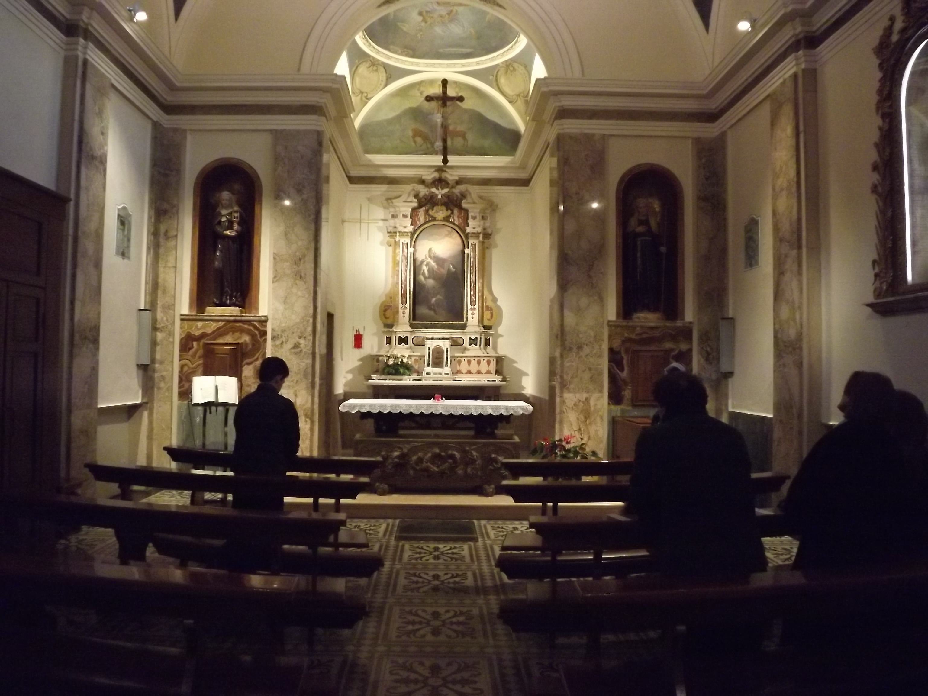 Capilla de Santa Dorotea, Casa Madre de las Hermanas de Santa Dorotea, Cemmo, Br. Italia. En ella se encuentra la tumba de la Beata Annunciata Cocchetti.